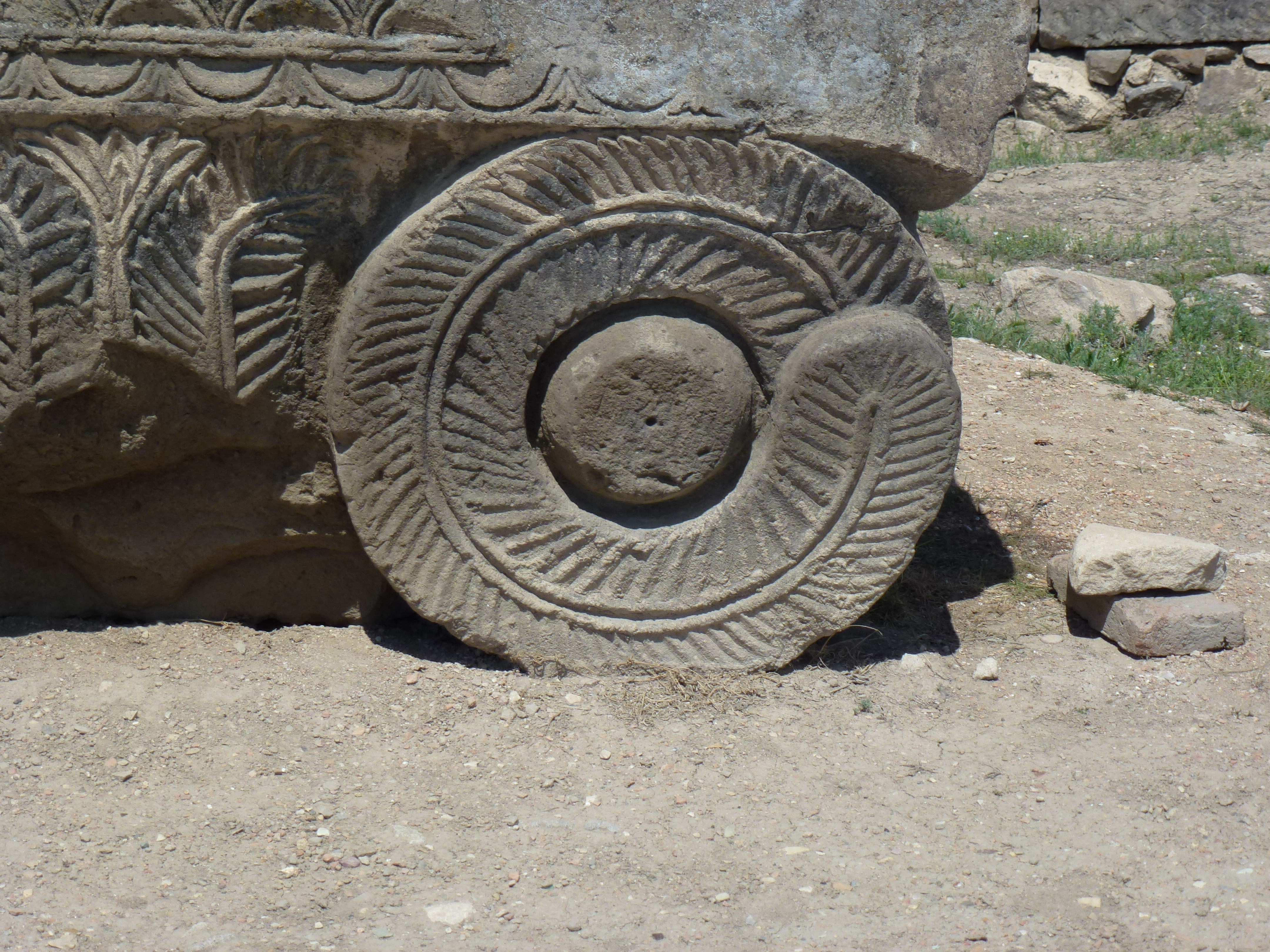 Դվինի ավերակներ, Հայաստան 53/1